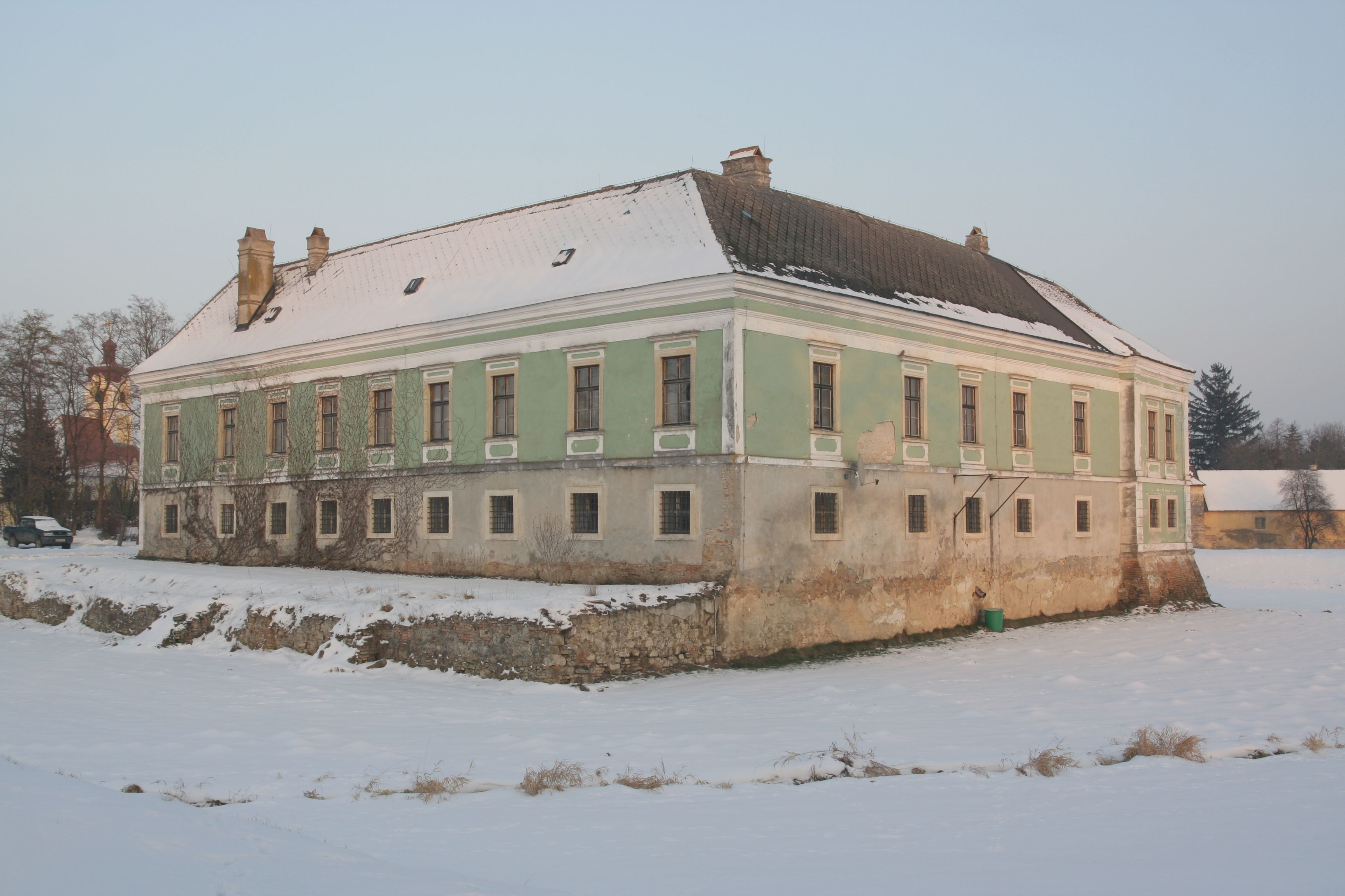 Jagdschloss Schmida